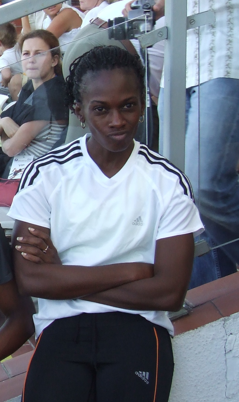 Andrea Blackett, barbadoska biegaczka (400 m ppł), Bydgoszcz Dolcan Cup 2007